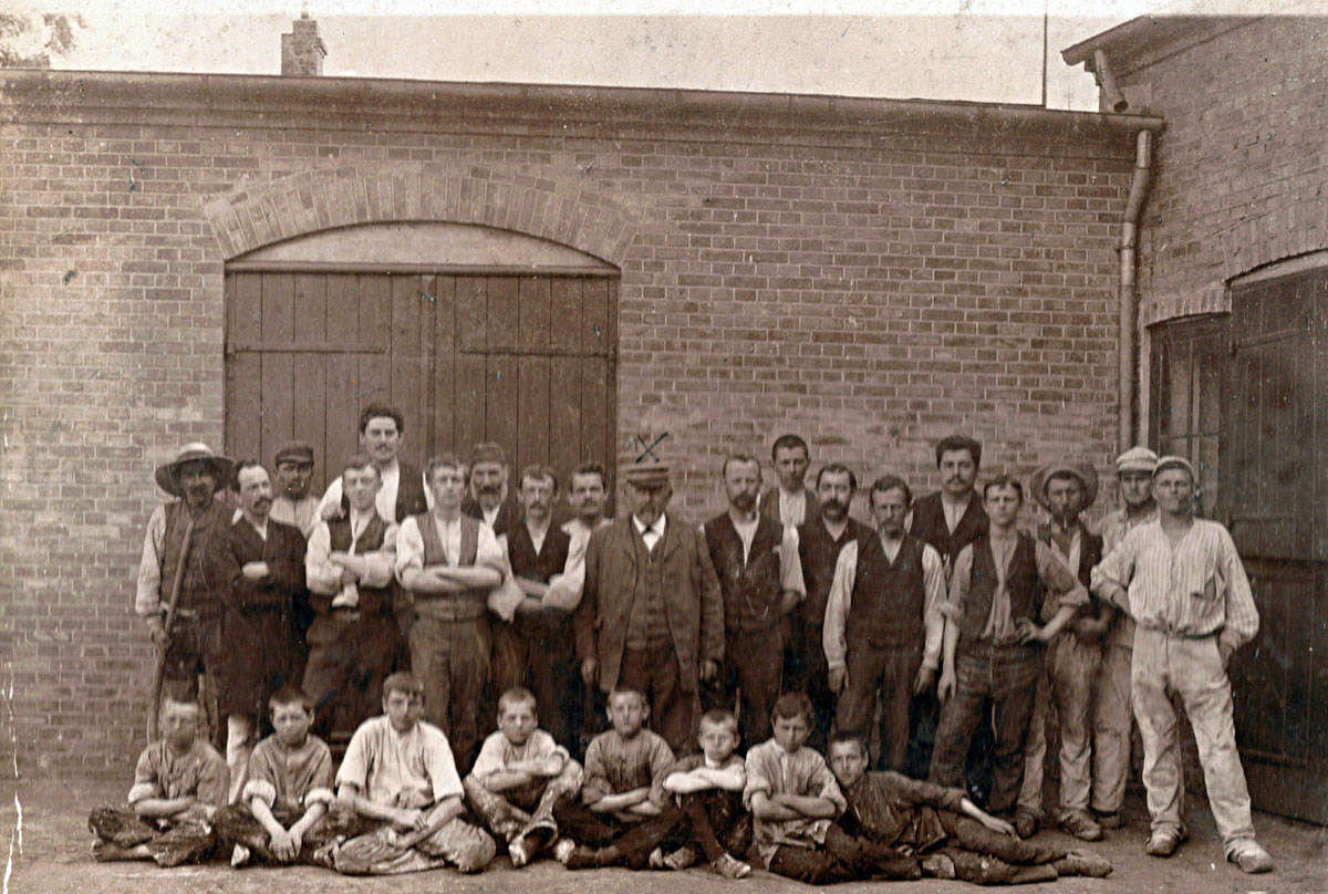 Personale, Chr. Jeppesens Guldliste Fabrik, Thyrasvej 2, Nørrebro, 1896